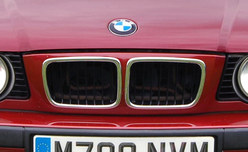 BMW 5-series